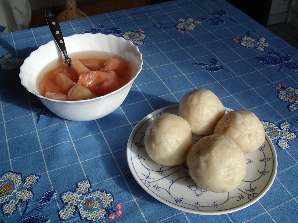 Klüten, norddeutsche Mehlklöße selbst fotografiert von Benutzer:Geoz own work by User:Geoz Oktober 2006